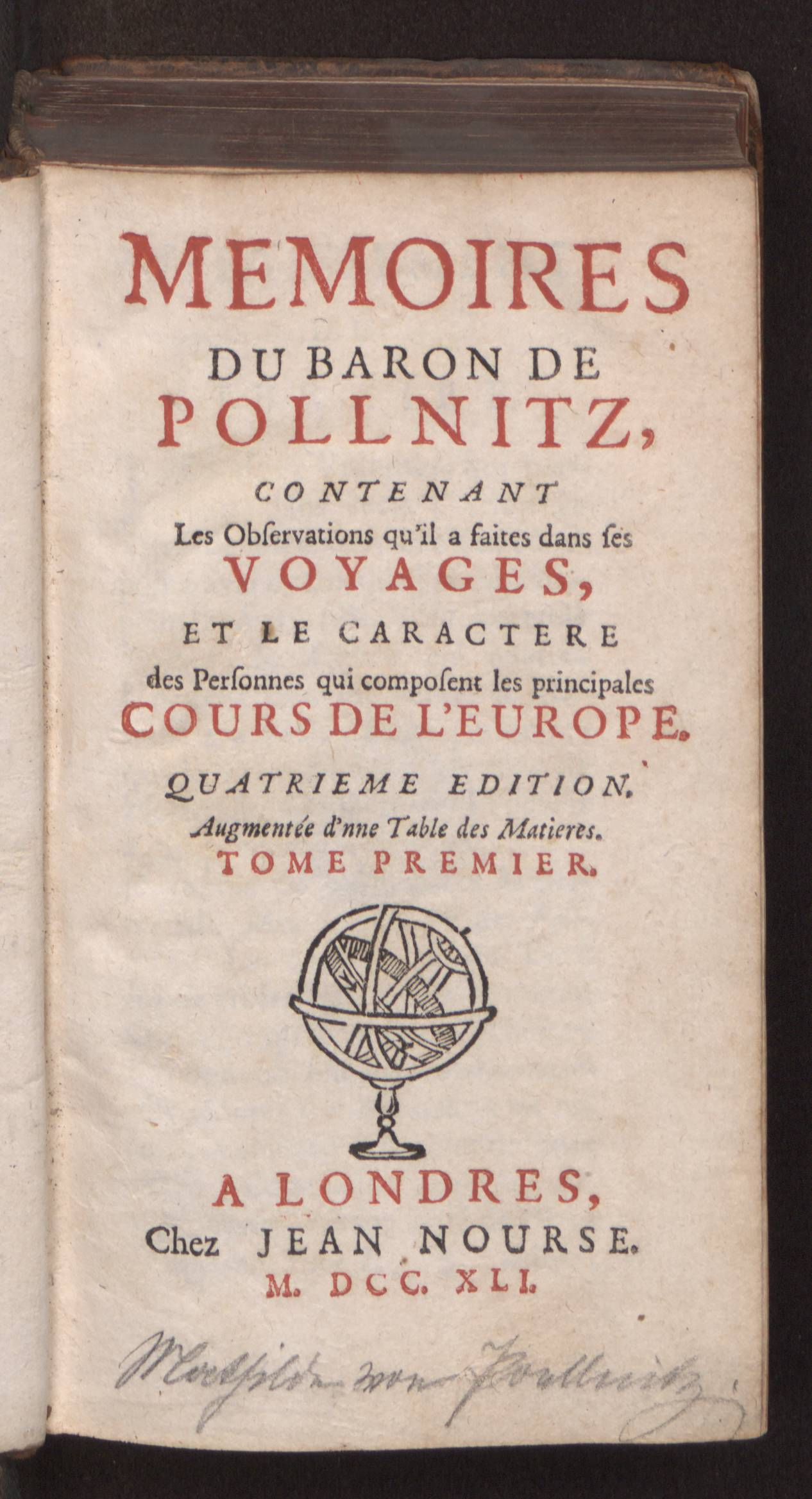 Frontespizio